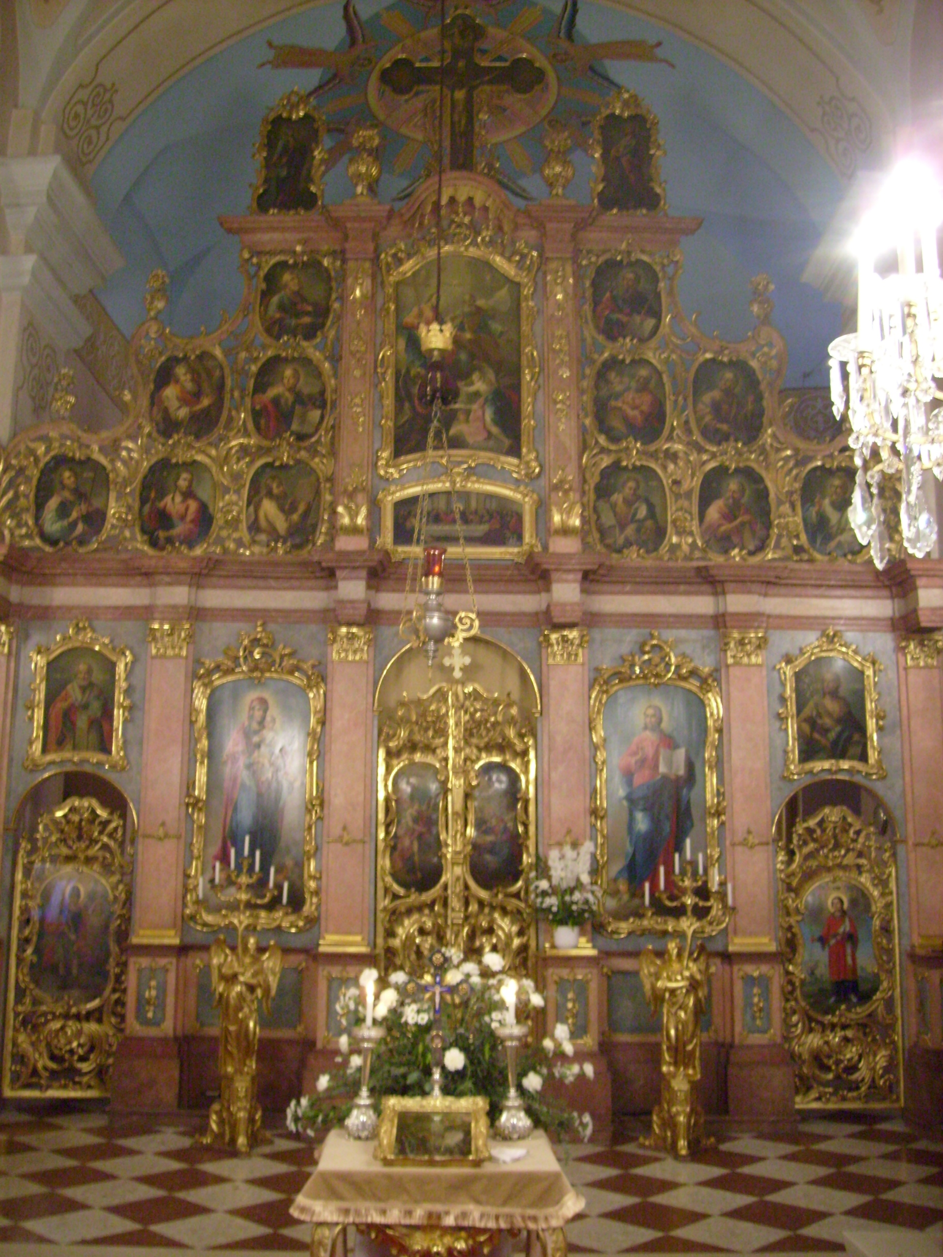 Ikonostasis der Barbarakirche in Wien.